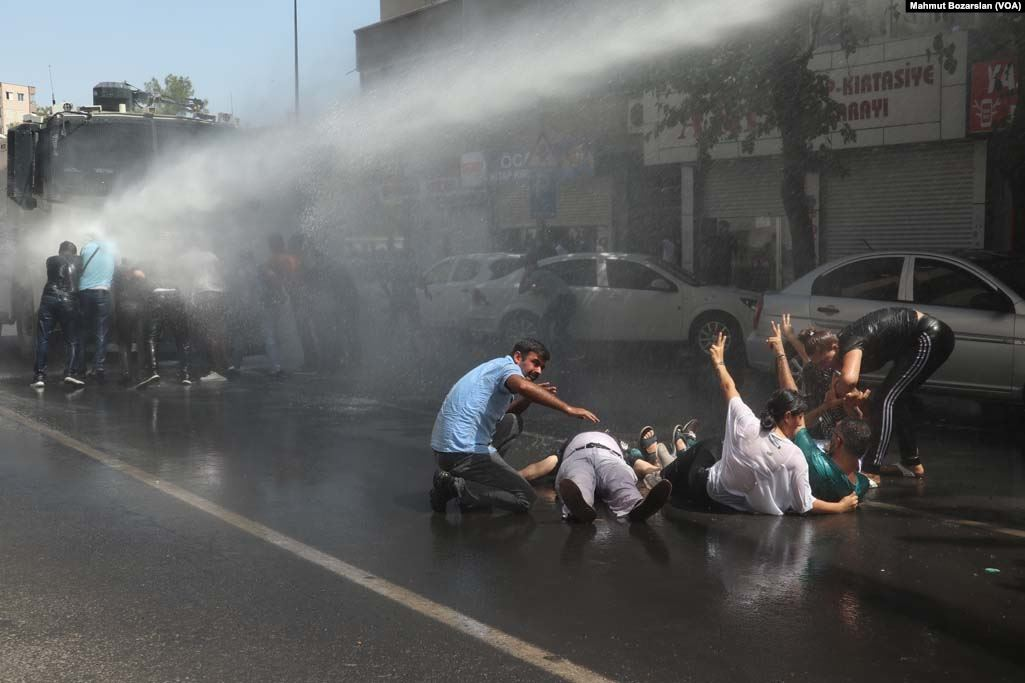 Belediye baskanlarının görevden alınması protestosu